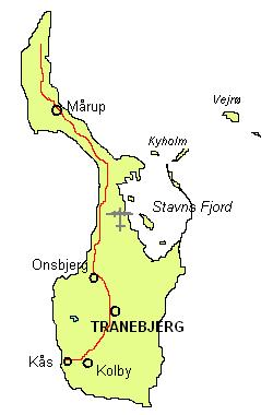 Samsø, Denmark